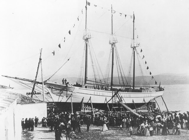 Imaxe do pailebote Constantino Candeira en 1918, no que estivo embarcado o poeta Manuel Antonio.